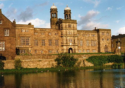 L'université de Stonyhurst vue de face